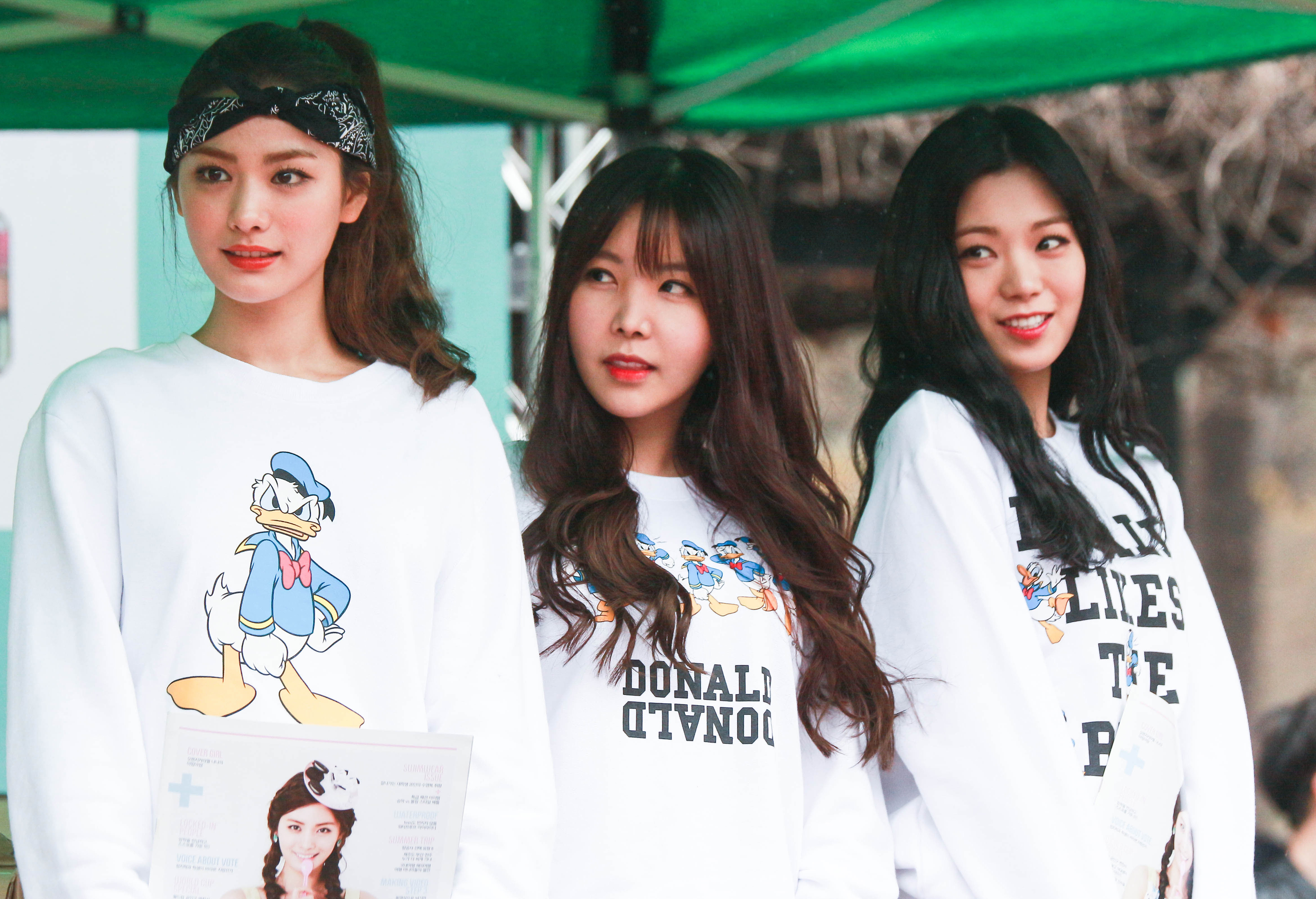 150331 오렌지캬라멜 고려대 민주광장 간식이벤트